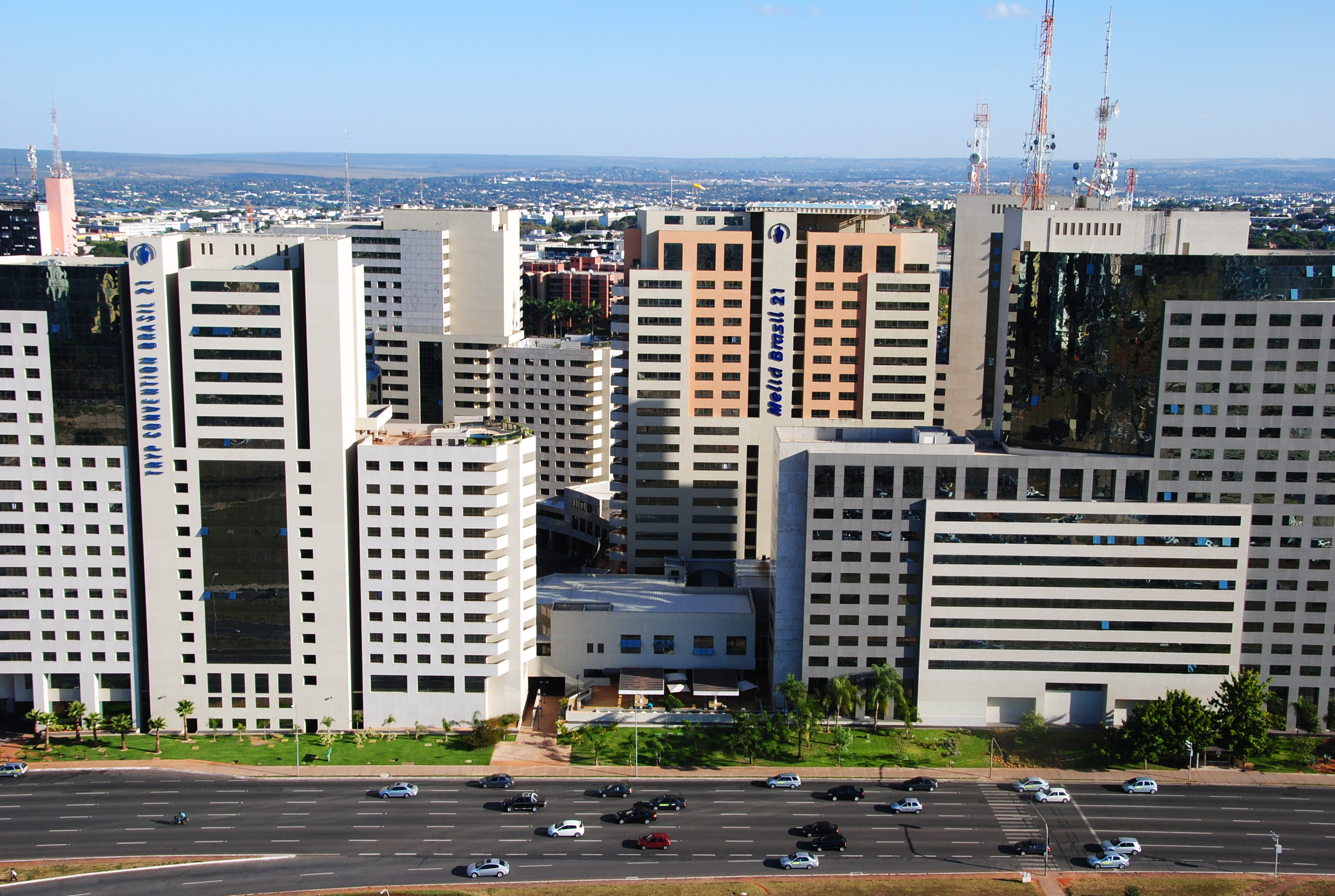 Setor Hoteleiro Sul de Brasília